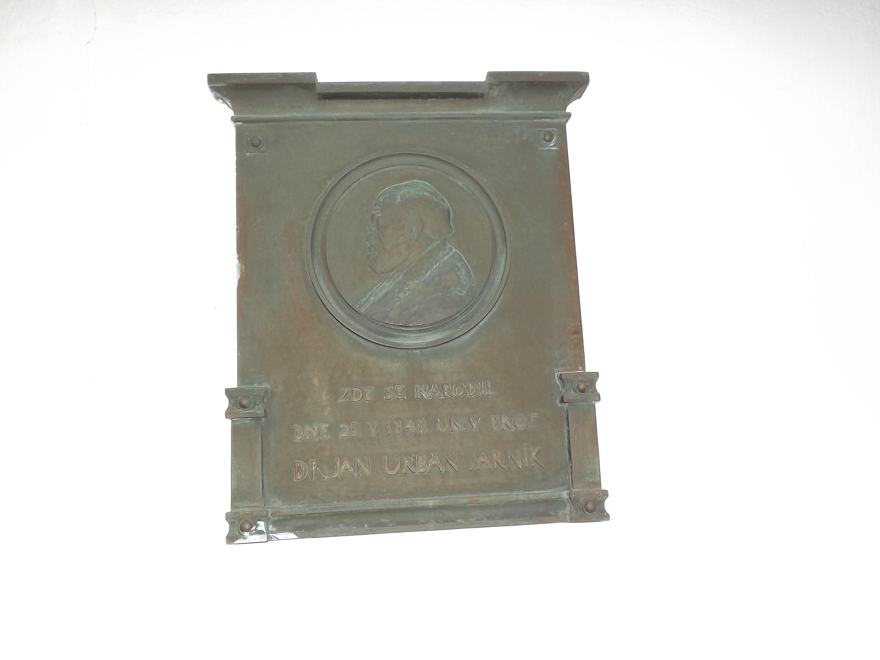 POtštejn